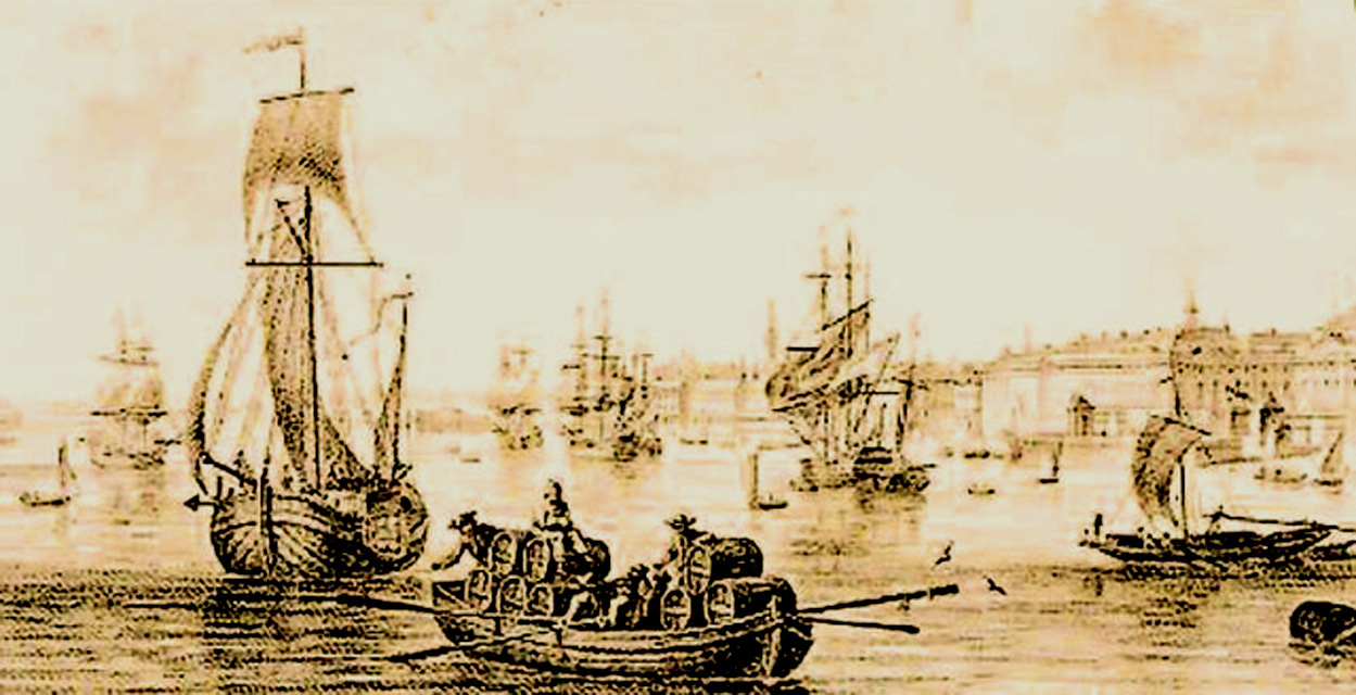 Le port de Bordeaux vu devant le château Trompette, 1776